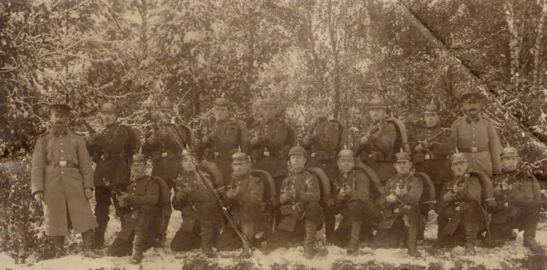 Żołnierze 9 Kołobrzeskiego Pułku Grenadierów im. Hrabiego Gneisenau (2 Pomorski) w 1915